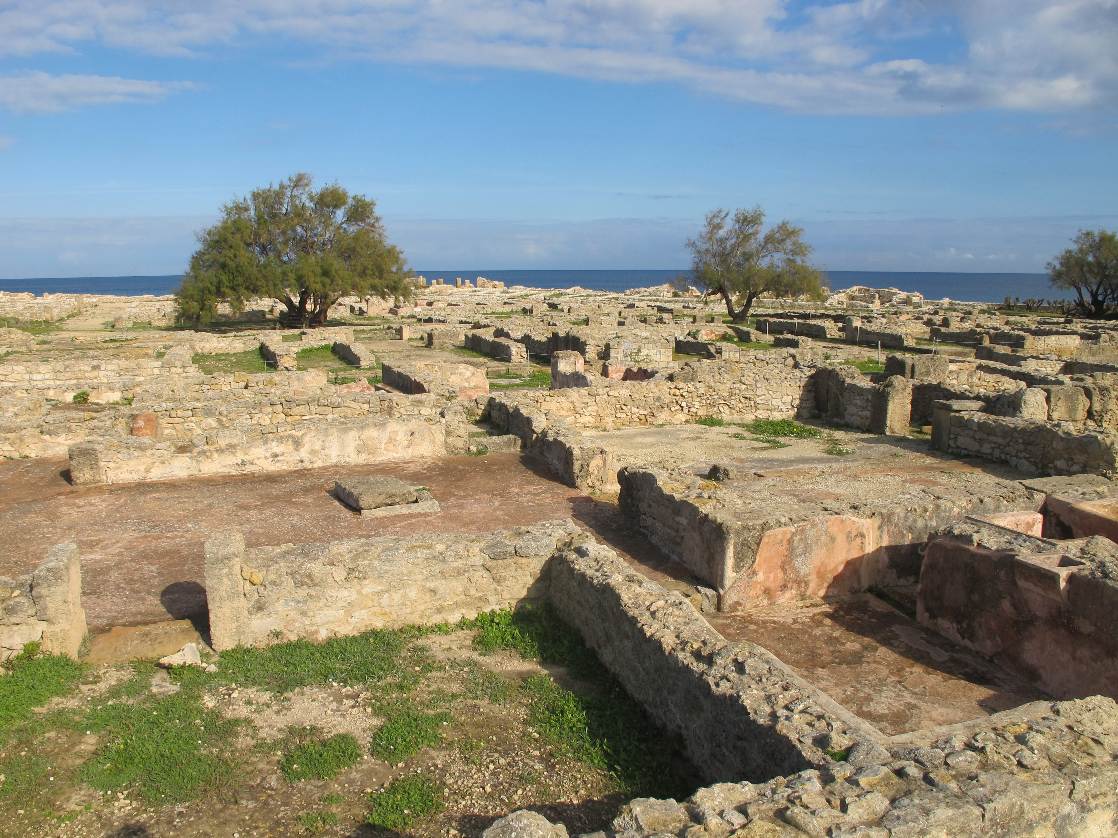 Kerkouane, Tunesien